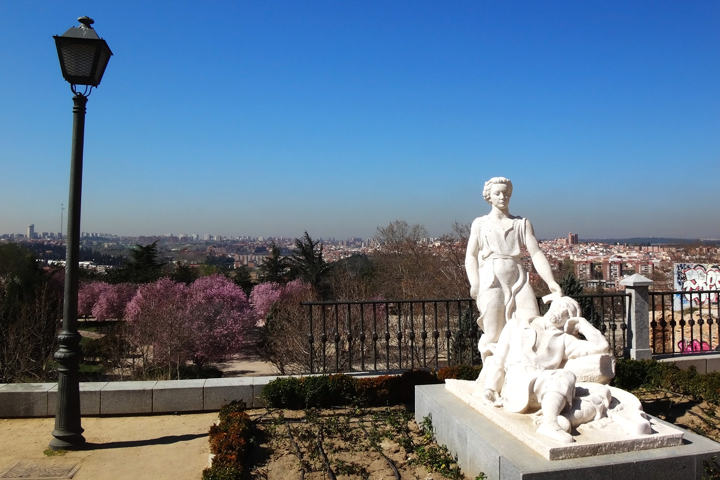 Вид на новый Мадрид.